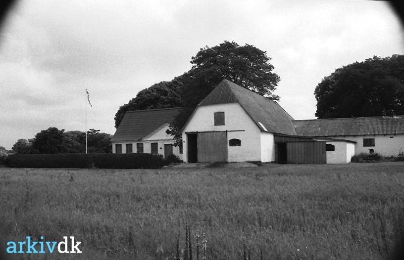 Gammel Høstemark efter den sydlige fløj er ombygget til stald og siddeliggende staldbygning er fortaget.